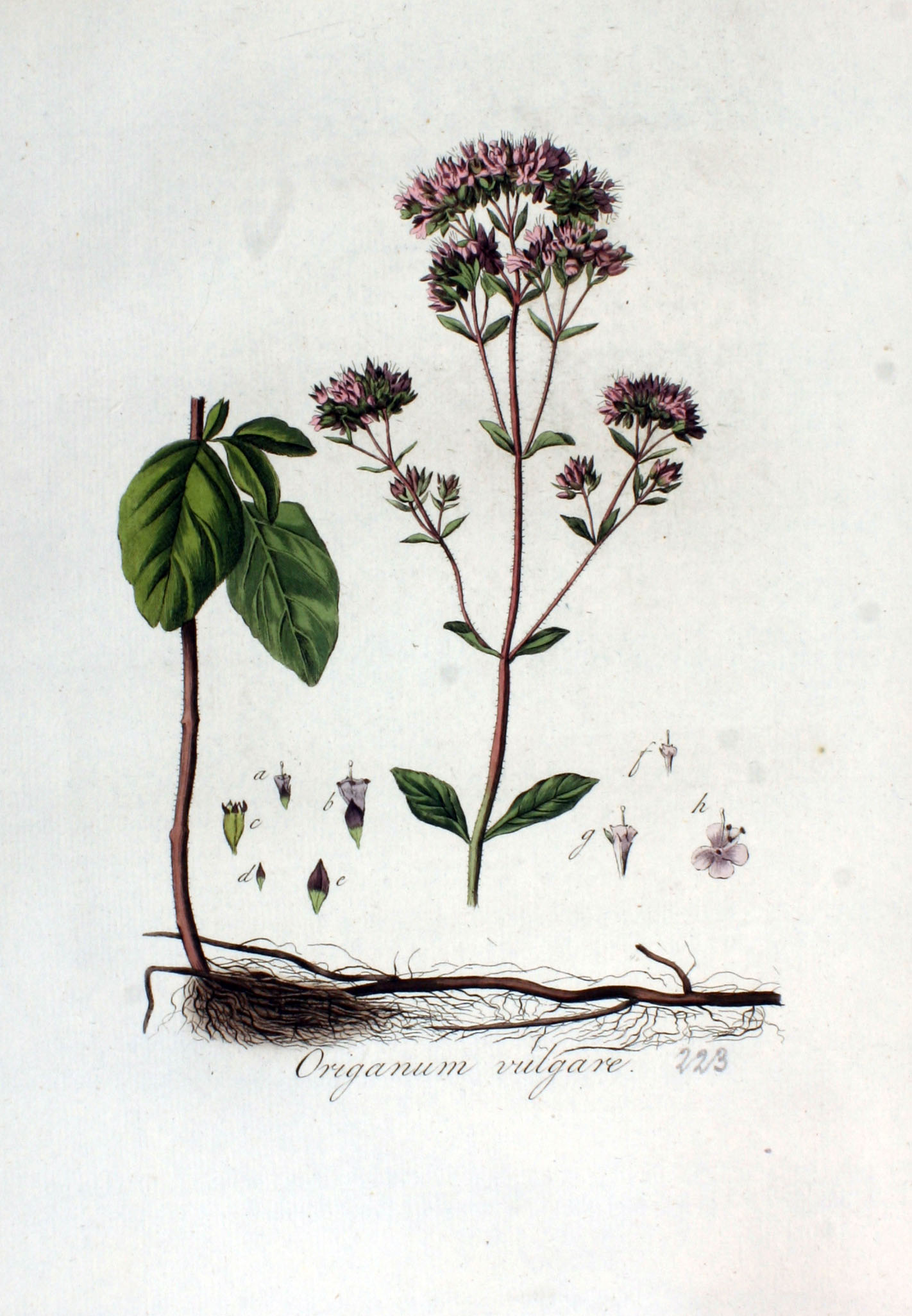 Origanum vulgare